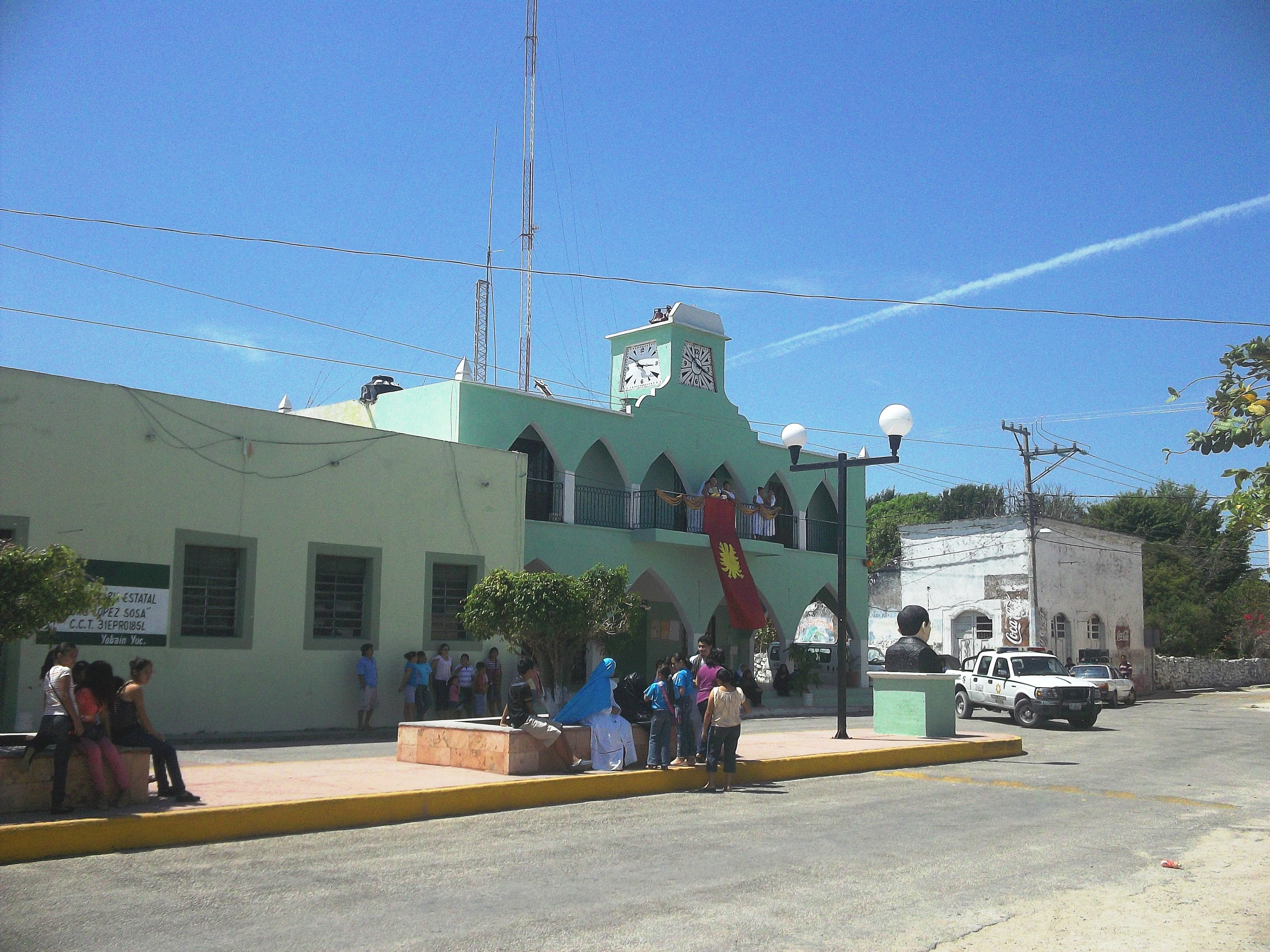 Palacio muncipal de Yobaín, Yucatán.